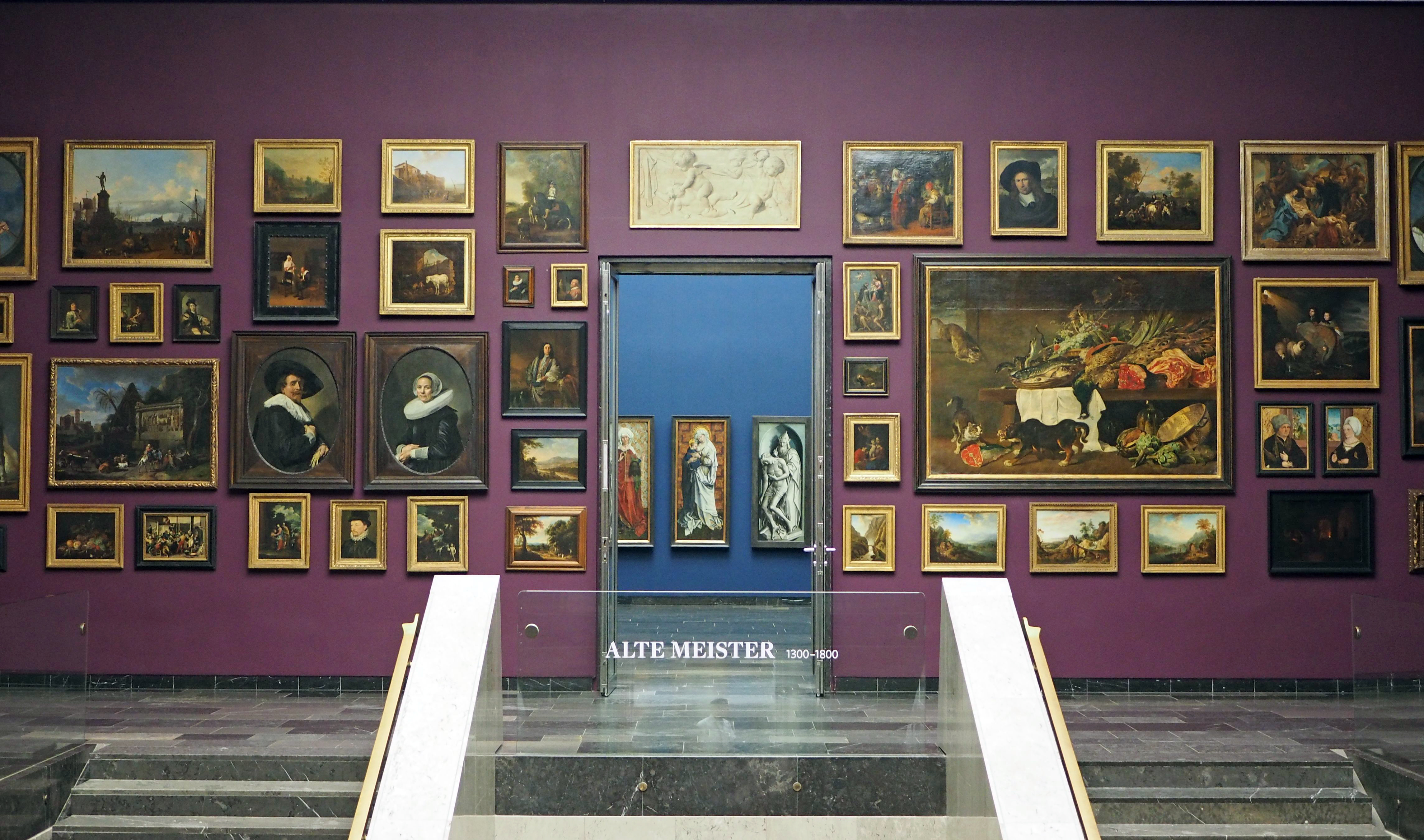 Städelsches Kunstinstitut Frankfurt a.M., Aufgang zum 2. Obergeschoss "Alte Meister" (1300–1800)